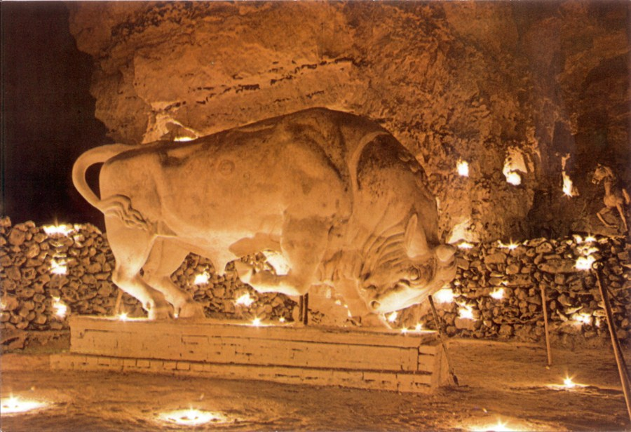 Cimbrertyren udført af billedhugger Anders Bundgaard